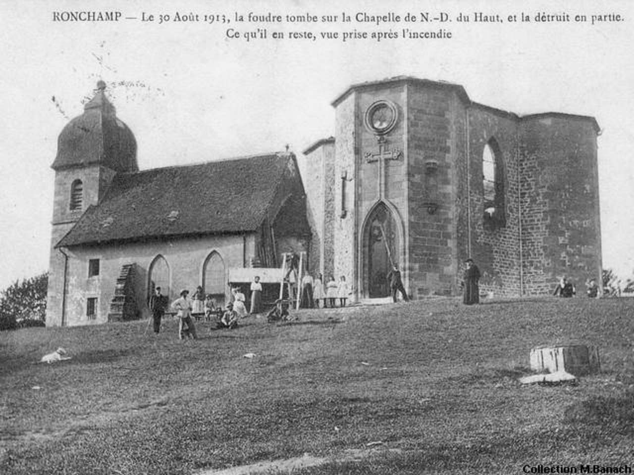 L'ancienne chapelle Notre-Dame-du-Haut à Ronchamp, avec clocher comtois ; détruite par un incendie